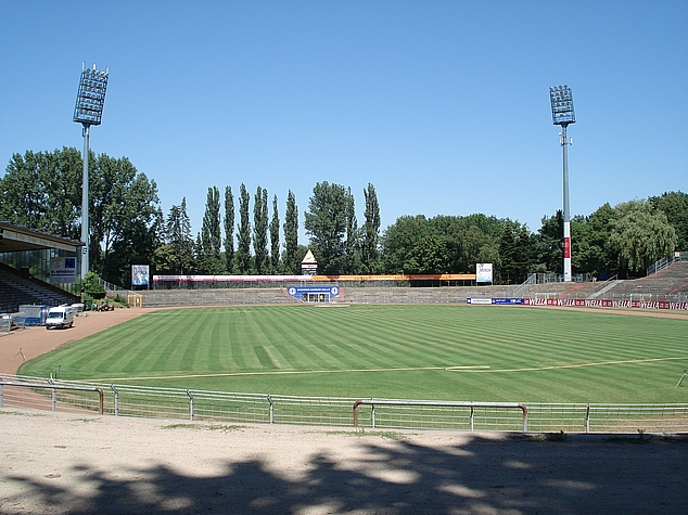 Blick von der Südkurve im Stadion am Böllenfalltor